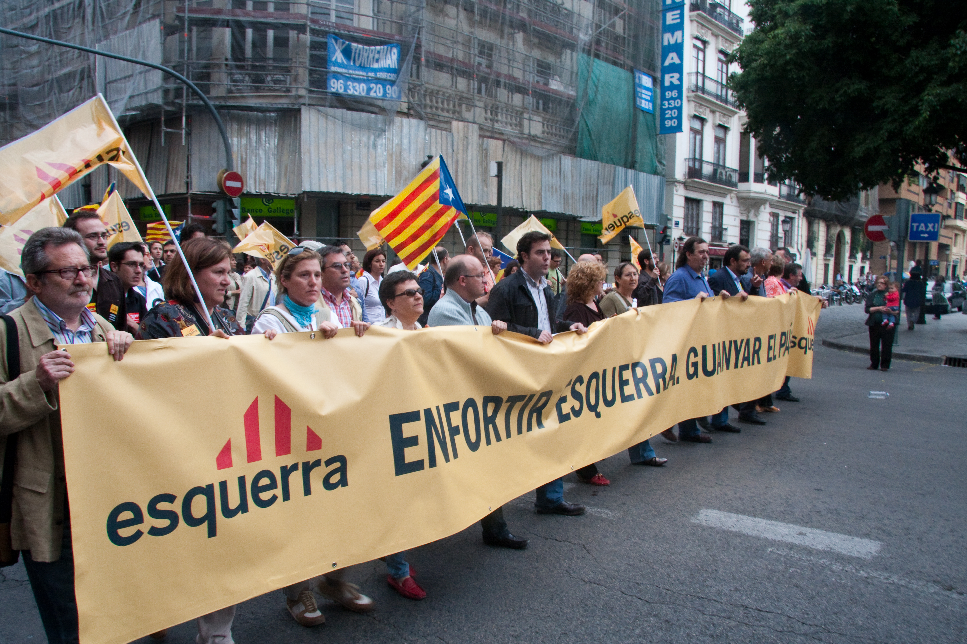 Pancarta del Partit Esquerra Republicana del País Valencià. + Informació: Fotografies de la manifestació i del concert del 9 de Maig a València en motiu del 302 aniversari de la Batalla d'Almansa.